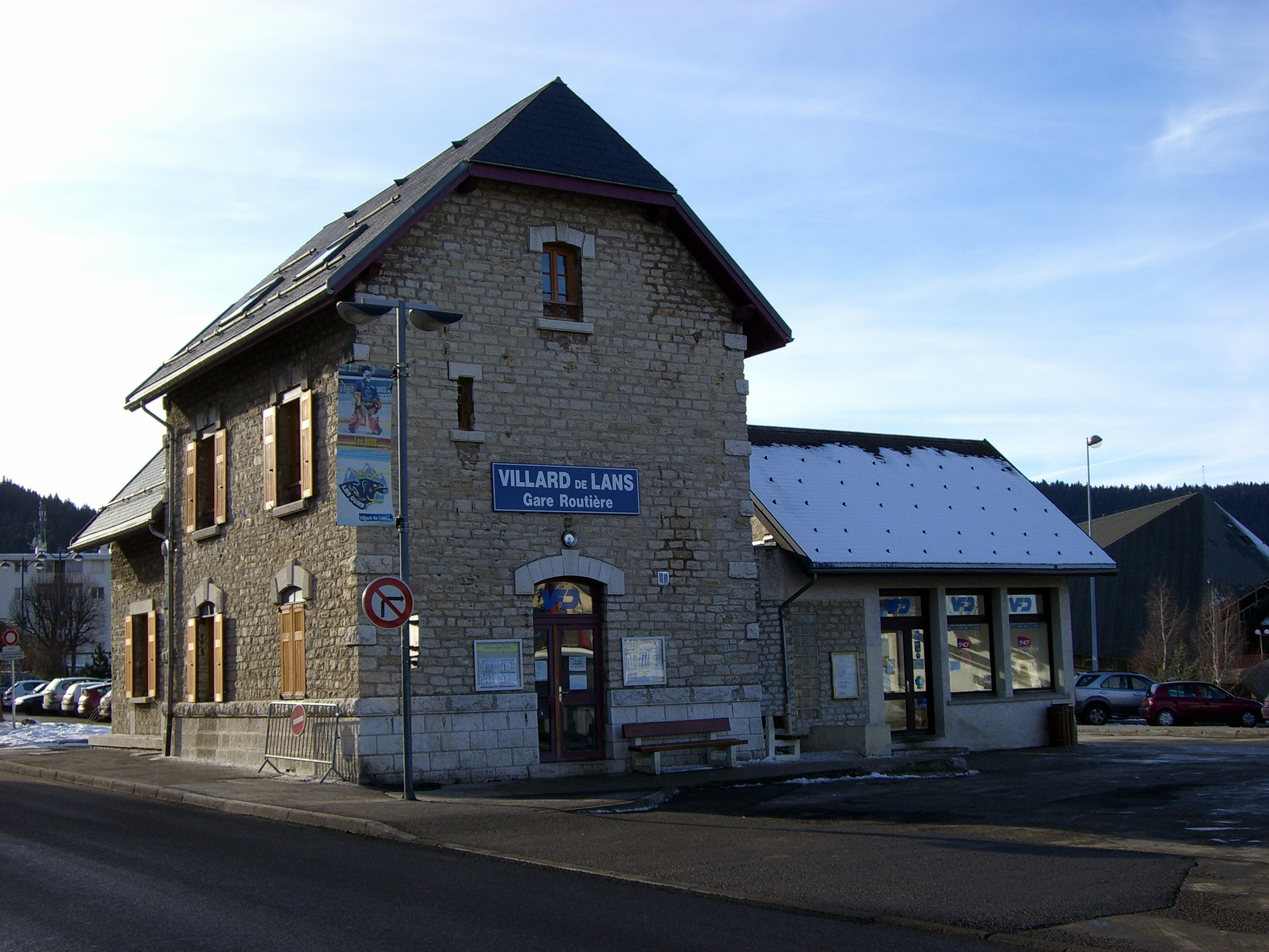 La gare routière de Villard-de-Lans (Isère, France).